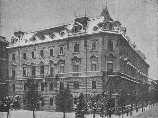 Towarzystwo Wzajemnych Ubezpieczeń w Krakowie, oddział we Lwowie